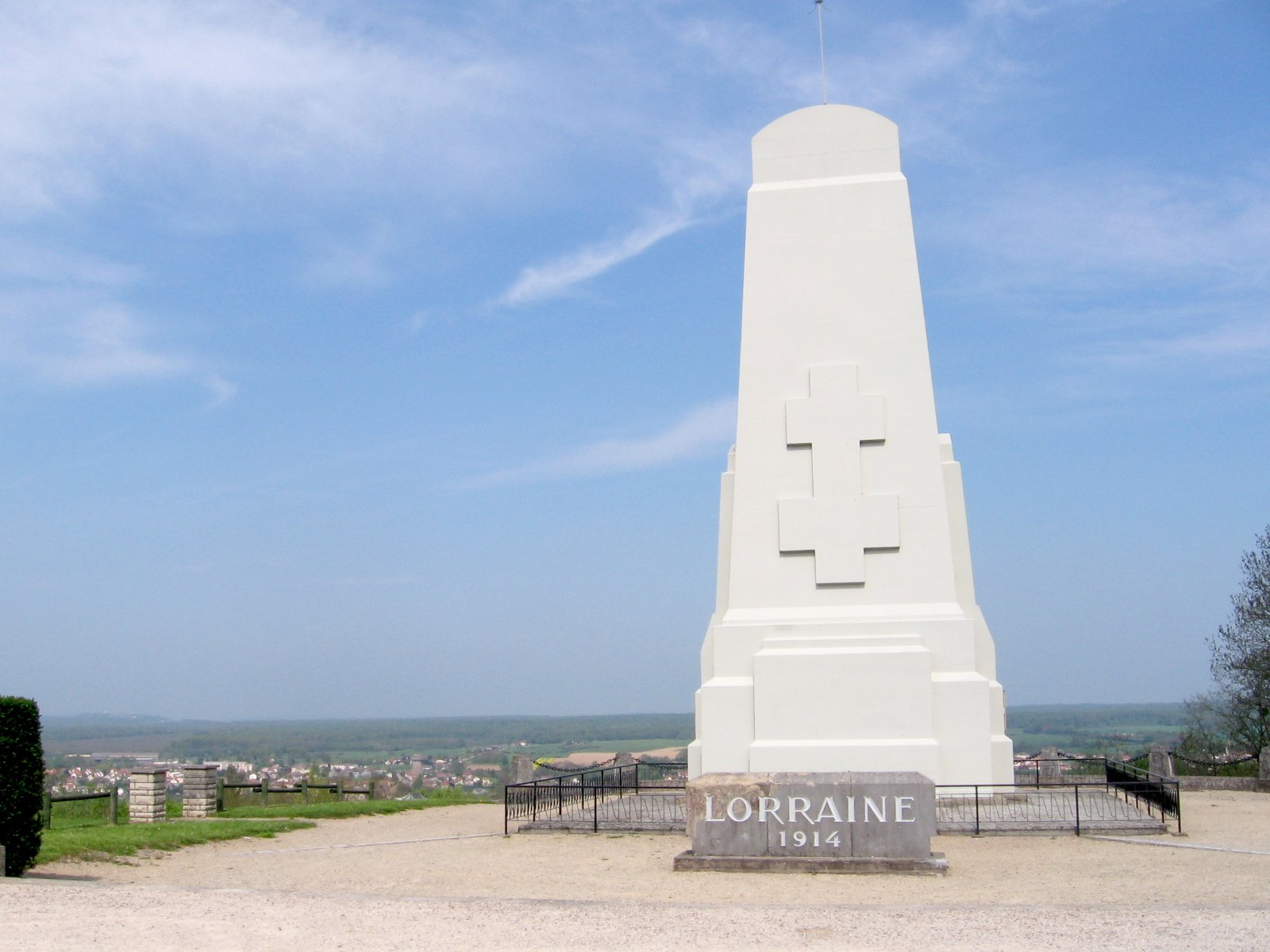 Monument de Lorraine, may 2006